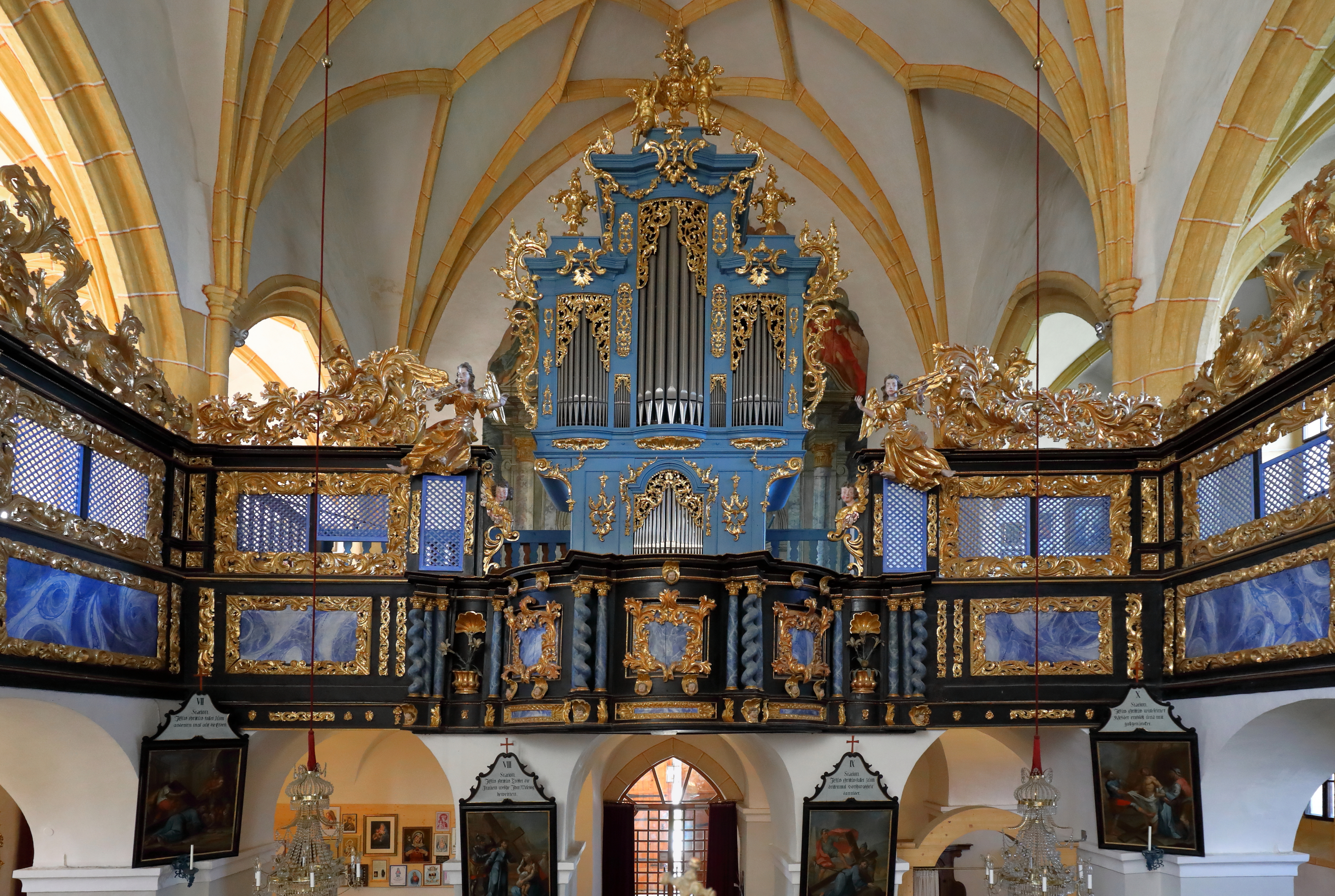 Blick in Richtung Orgelempore in der Wallfahrtskirche Maria Rehkogel in Frauenberg, ein Ortsteil der steirischen Marktgemeinde St. Marein im Mürztal.Die dreiachsige Orgelempore und die anschließenden Seitenschiffemporen mit geschnitzten Brüstungen wurden von 1682 bis 1688 eingebaut. Die Orgel mit prächtigem Gehäuse ist ein Werk des Orgelbauers Anton Josef Römer (* 28.2.1724 Brünn, † 14.7.1779 Graz) aus dem Jahr 1774/75.